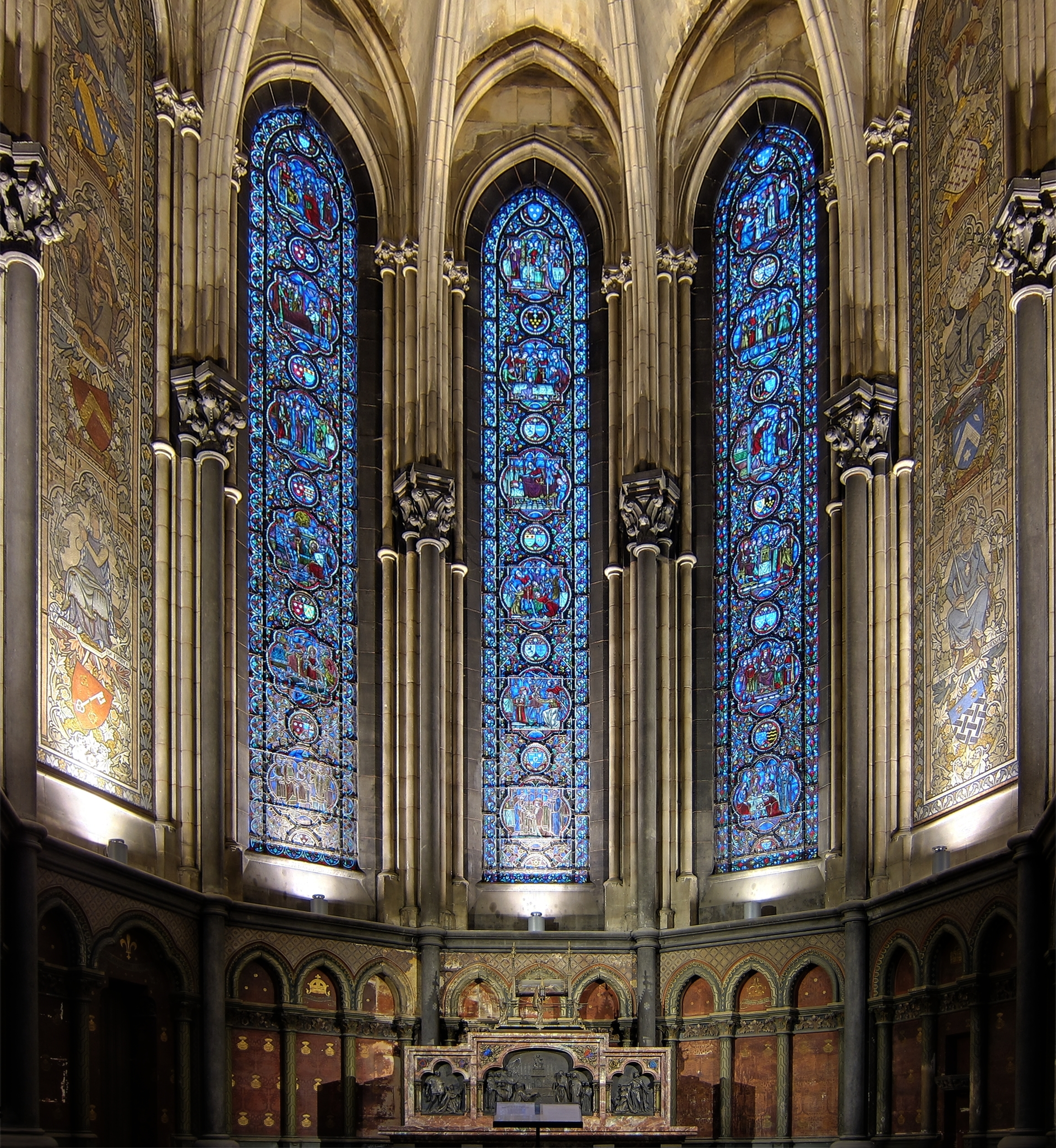 La chapelle Saint-Charles dans la cathédrale Notre-Dame-de-la-Treille de Lille (Nord).